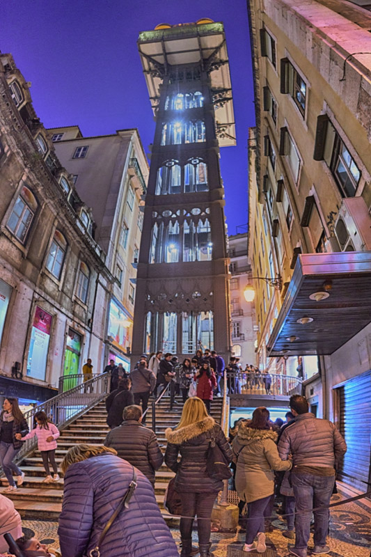 Elevador Santa Justa, nocturna